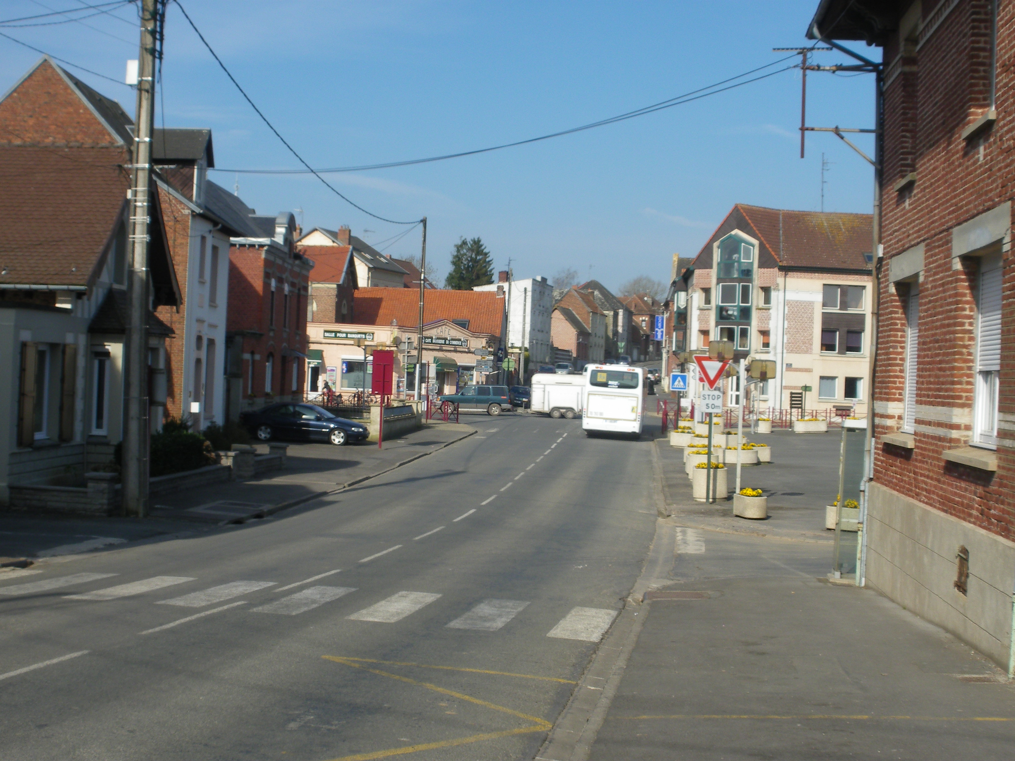 Vue du centre de la commune de Bucquoy.